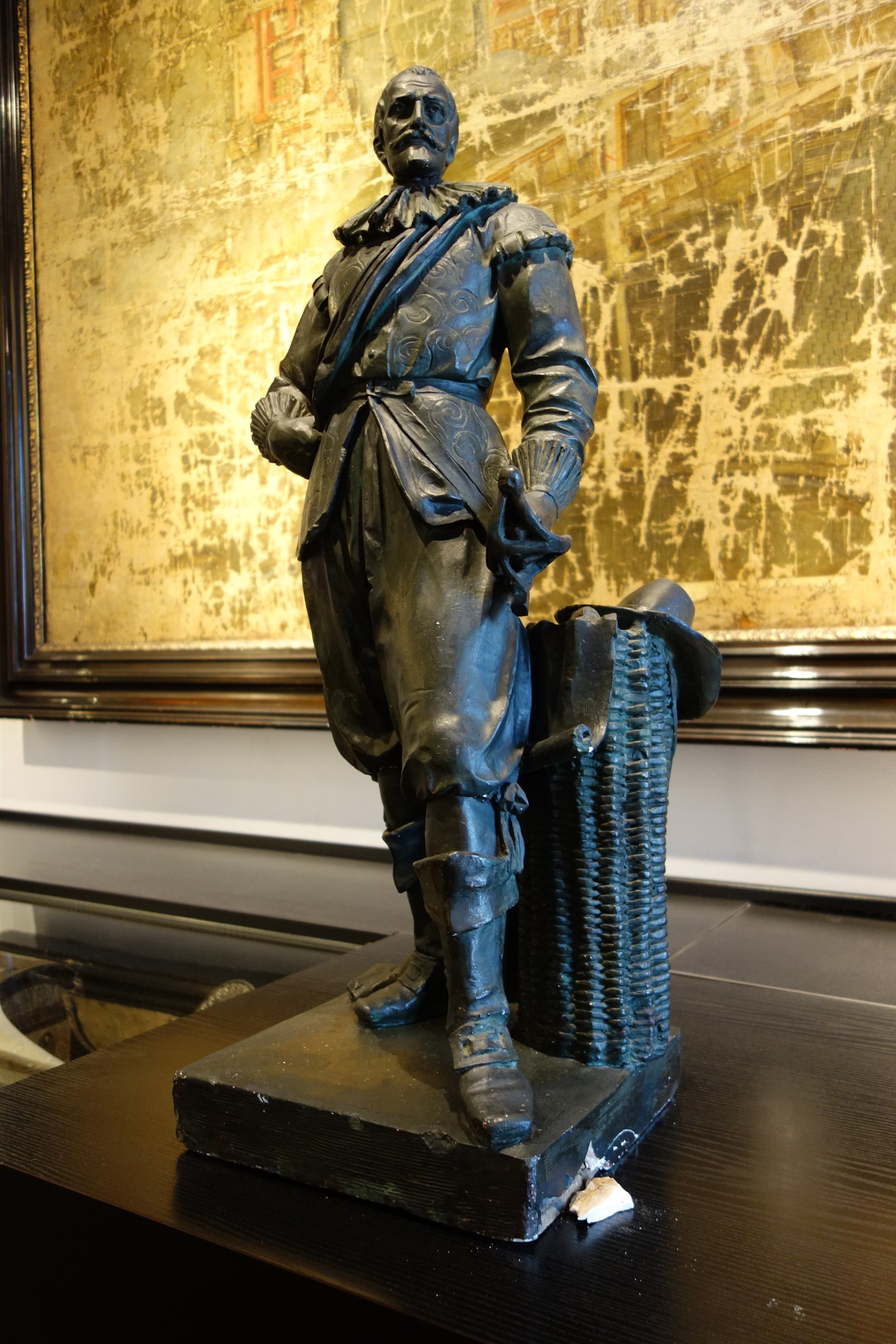 Gipsen studiemodel voor potentiële beeld van Jan Pieterszoon in het Westfries Museum.